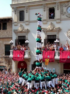 1era torre de 9 amb folre carregada de la història